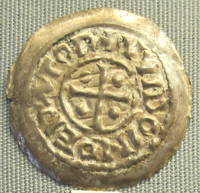 Spoleto, denaro di stampo largo del duca guido, 889-894